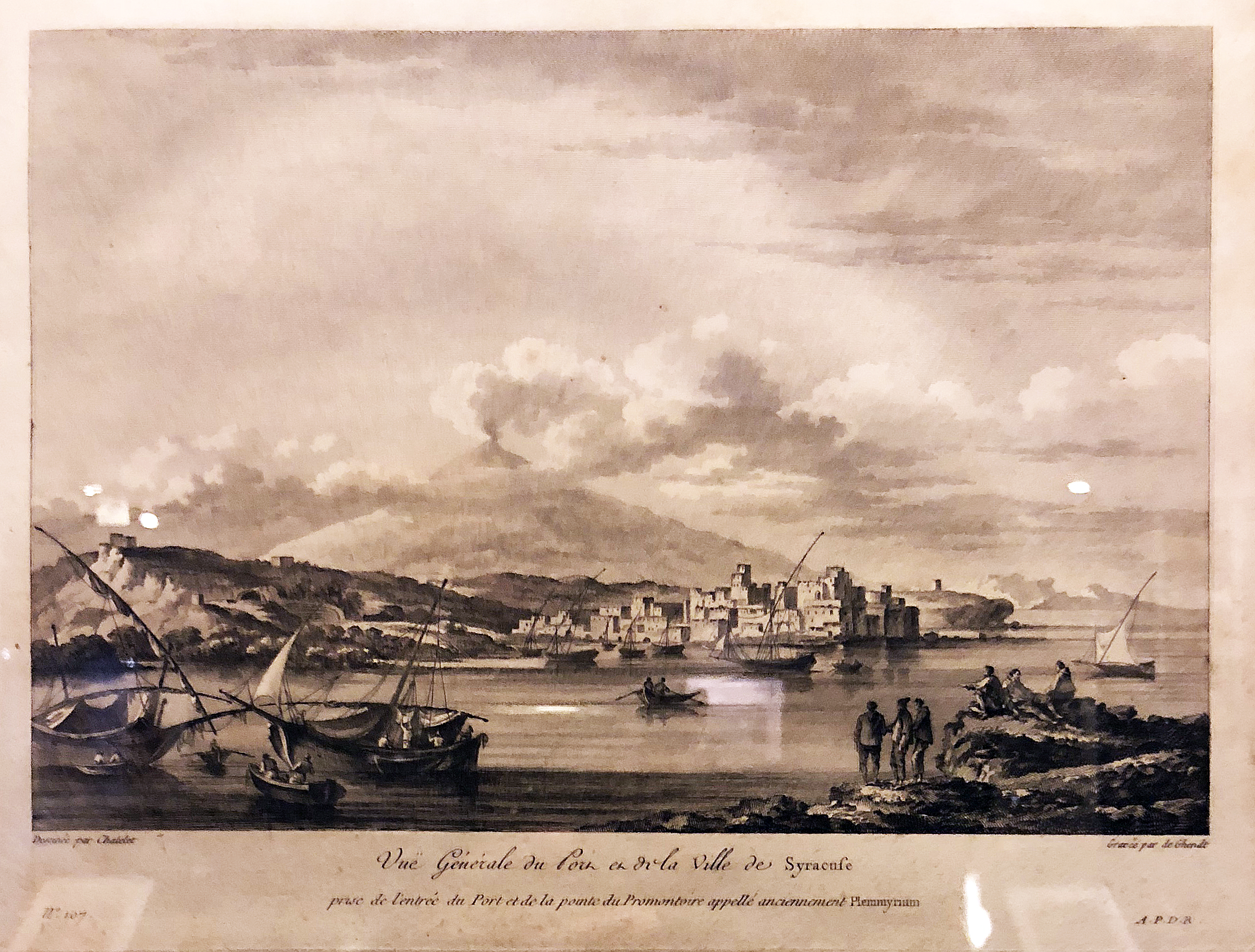 Ripresa dal promontorio del Plemmirio